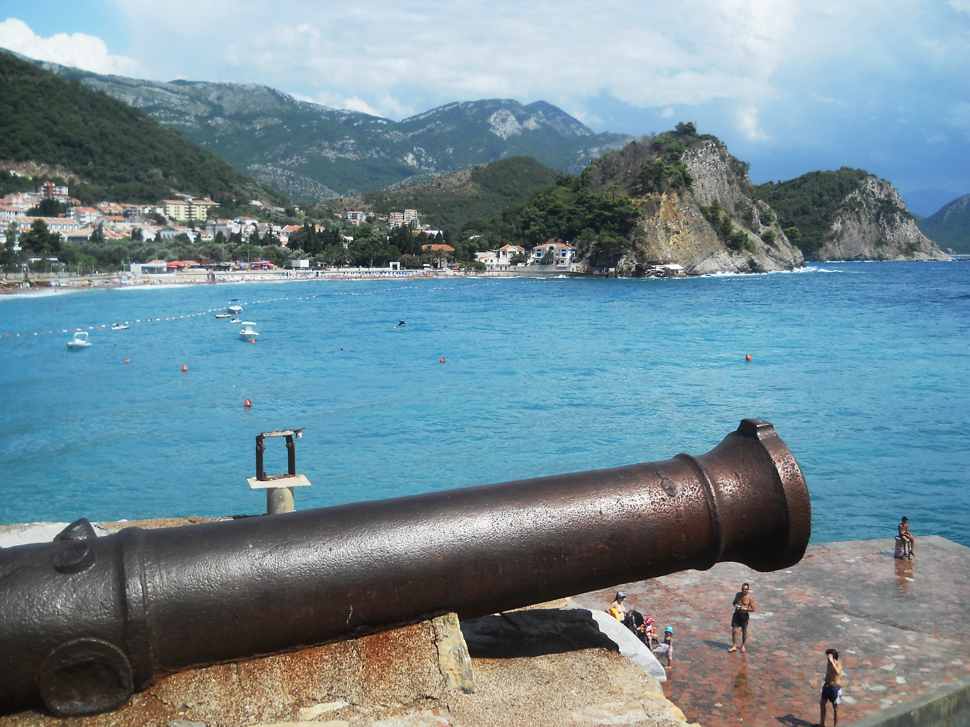 Топ на тврђави Кастел Ластва у Петровцу на Мору.